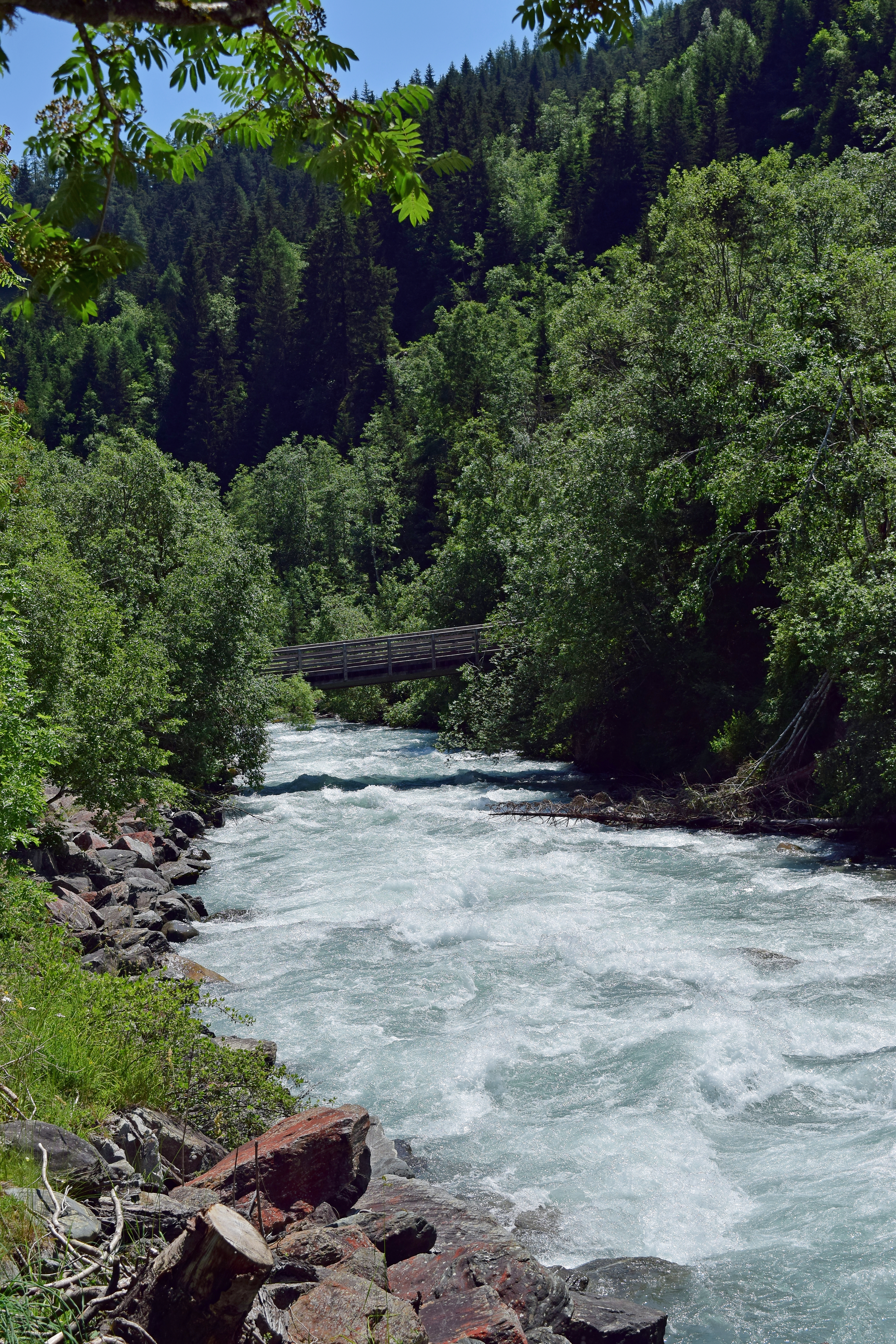 Die Isel im Gemeindegebiet von Mitteldorf in der Gemeinde Virgen.